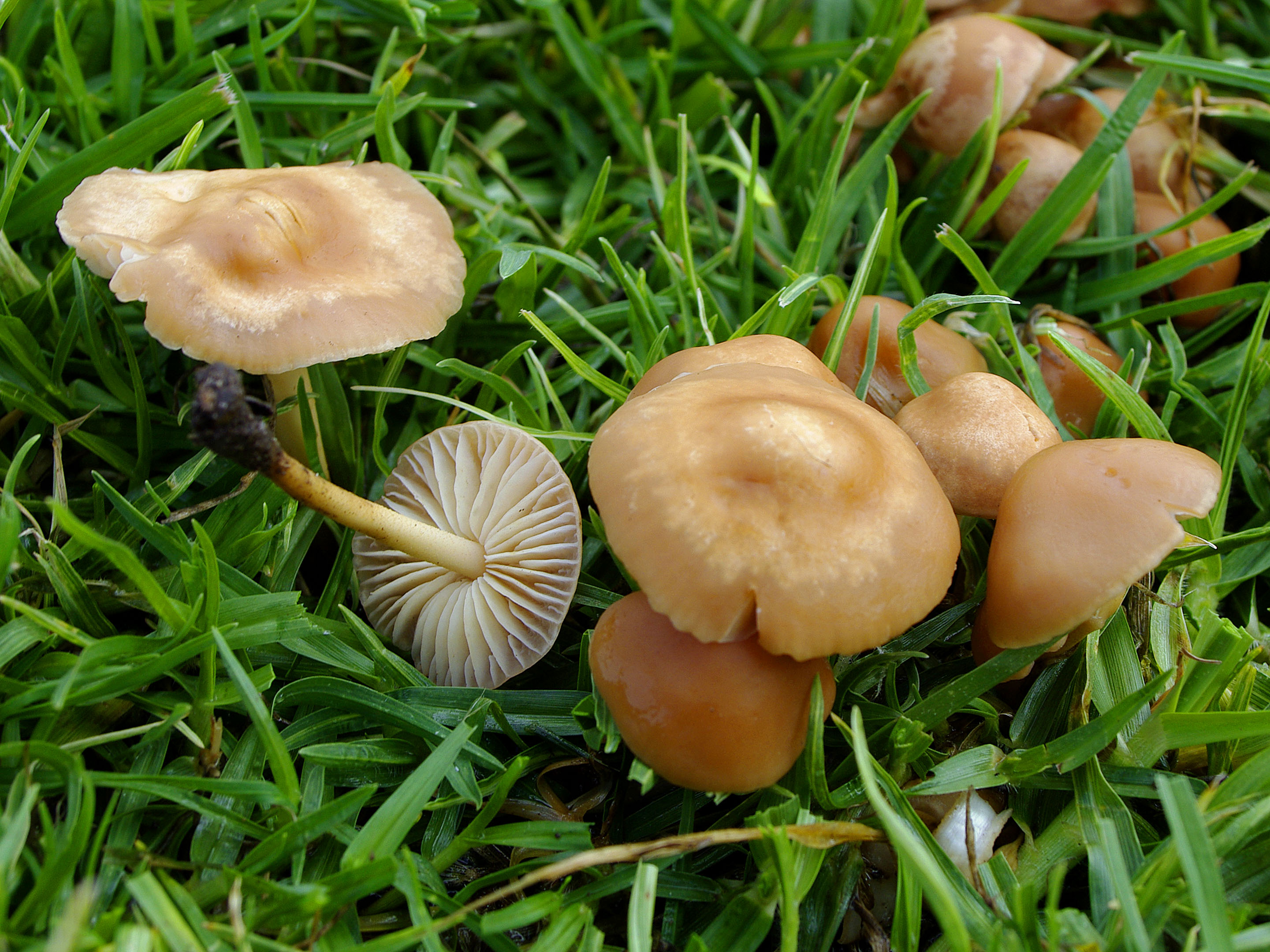 Marasmius oreades (Bolton) Fr.